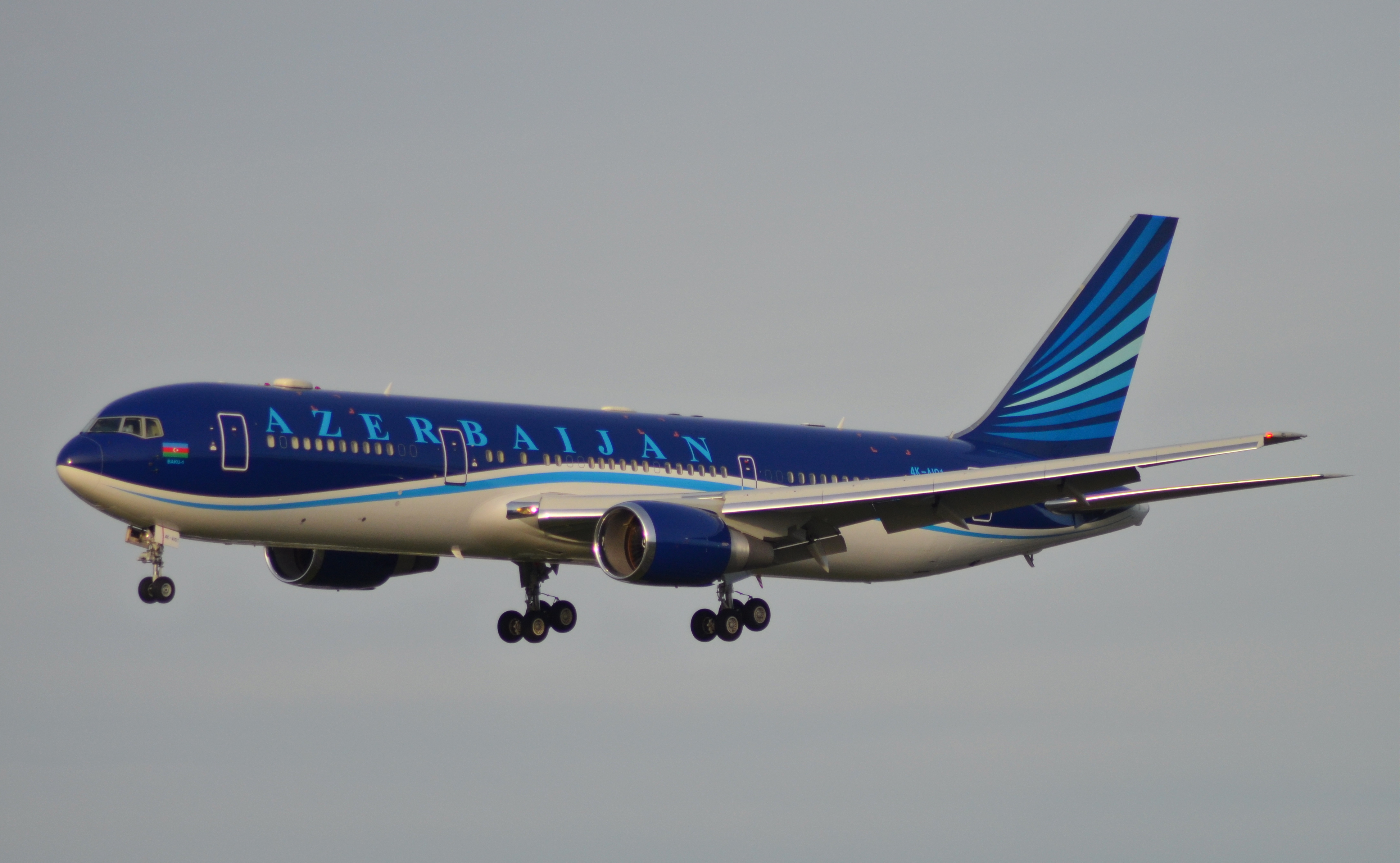 Boeing 767-32L Azerbaijan 4K-AI01